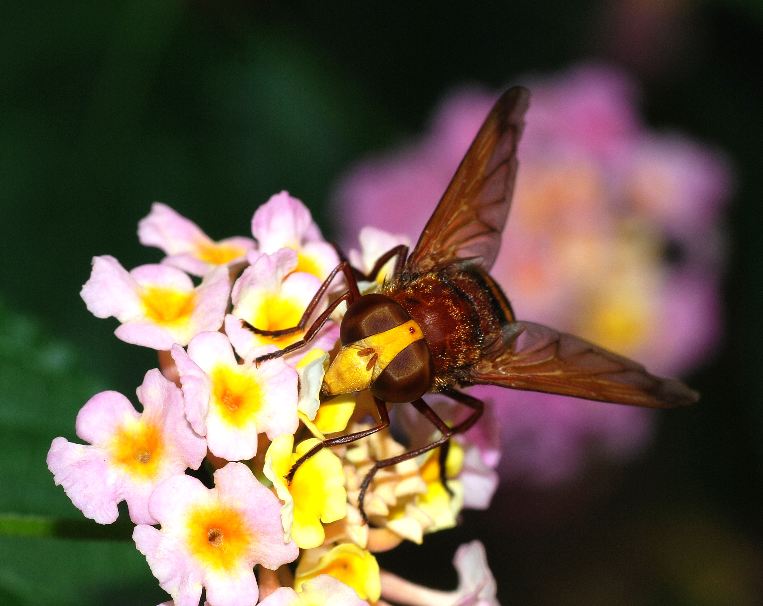 Hoverfly (Volucella zonaria)